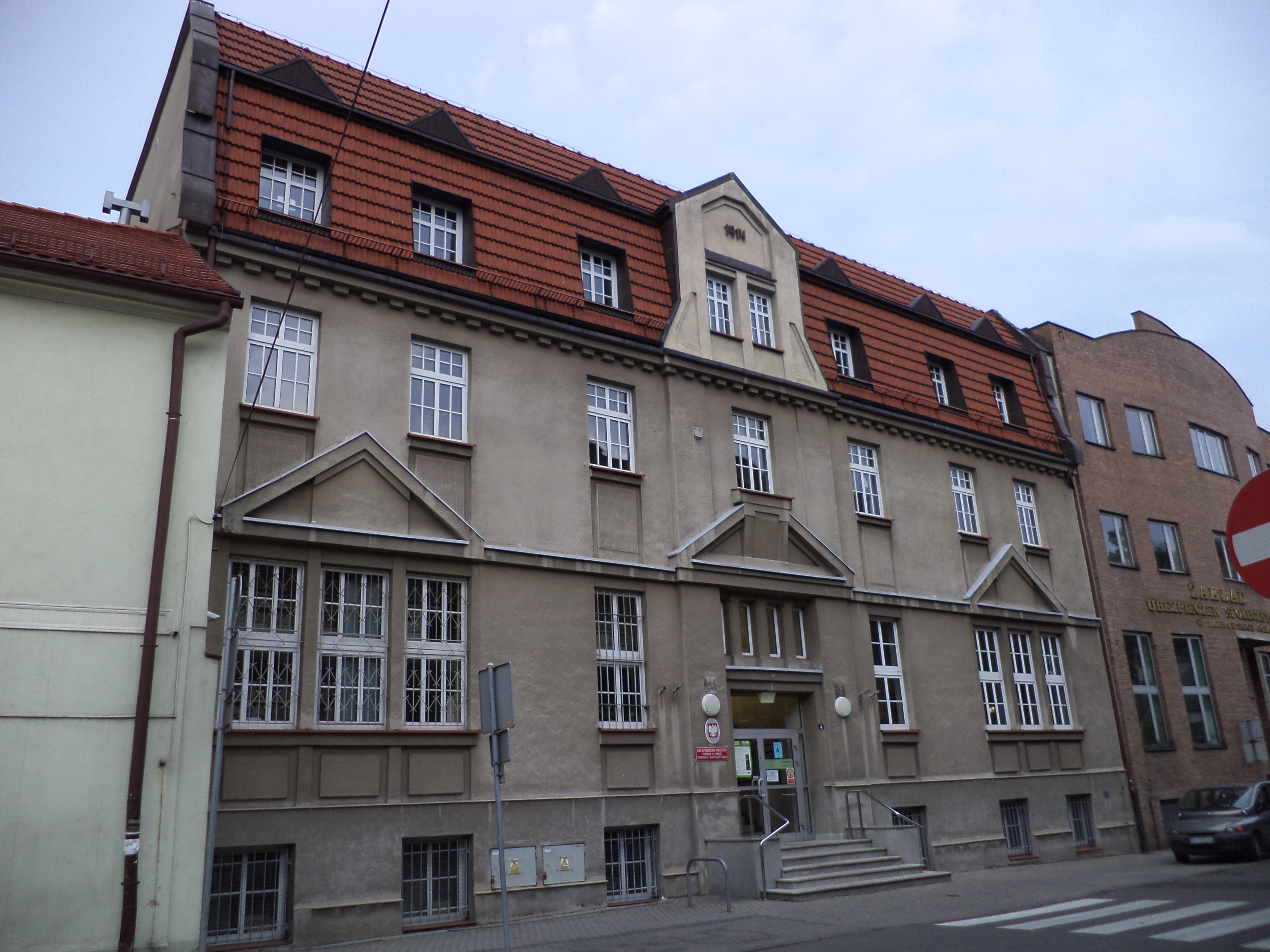 Budynek dawnej siedziby tarnogórskiej gminy żydowskiej. Obecnie ZUS